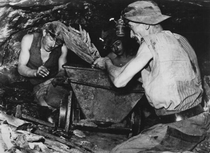 Bergarbeiter, Lore Zentralbild Paalzow 4.1.1952 Die Kumpels vom Mansfeld Kombinat "Wilhelm Pieck"Die Lehrhäuer Otto Scharch, Kurt Hoffmann und Häuer Rudolf Henze füllen einen Hund mit Kupferschiefer vor Streb.Sie gehören zur Brigade "Heinrich Schäfer" vom Otto Brosowskischacht, die sich verpflichtete, 3% für den Aufbau Berlins zu zeichnen.